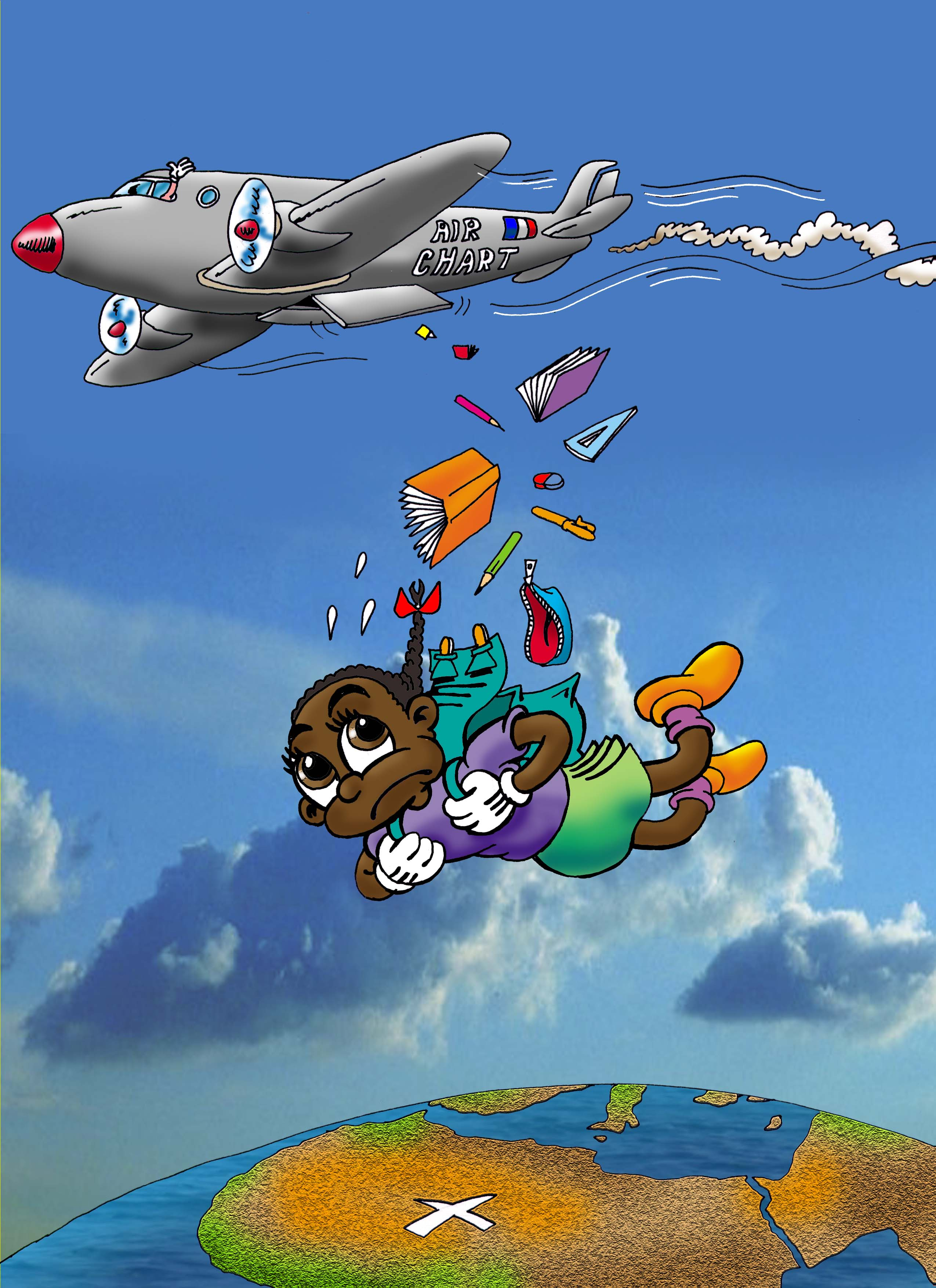 Carte postale RESF/MRAP